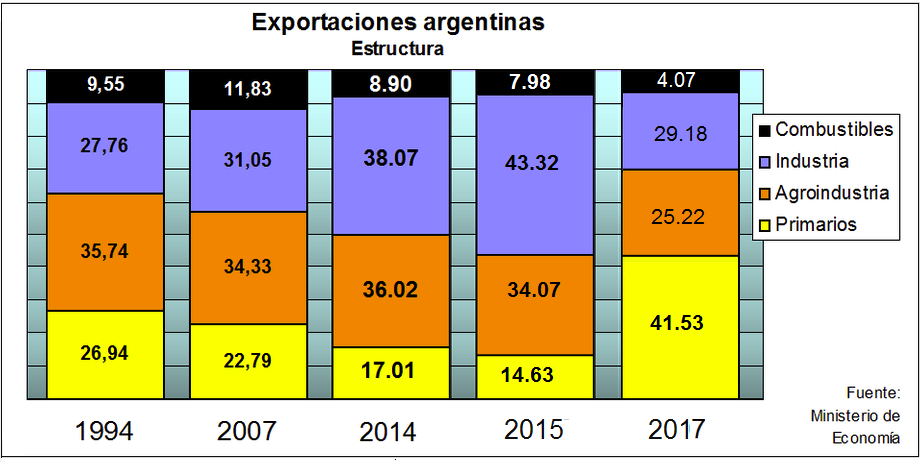 Exportaciones argentinas abril 2017